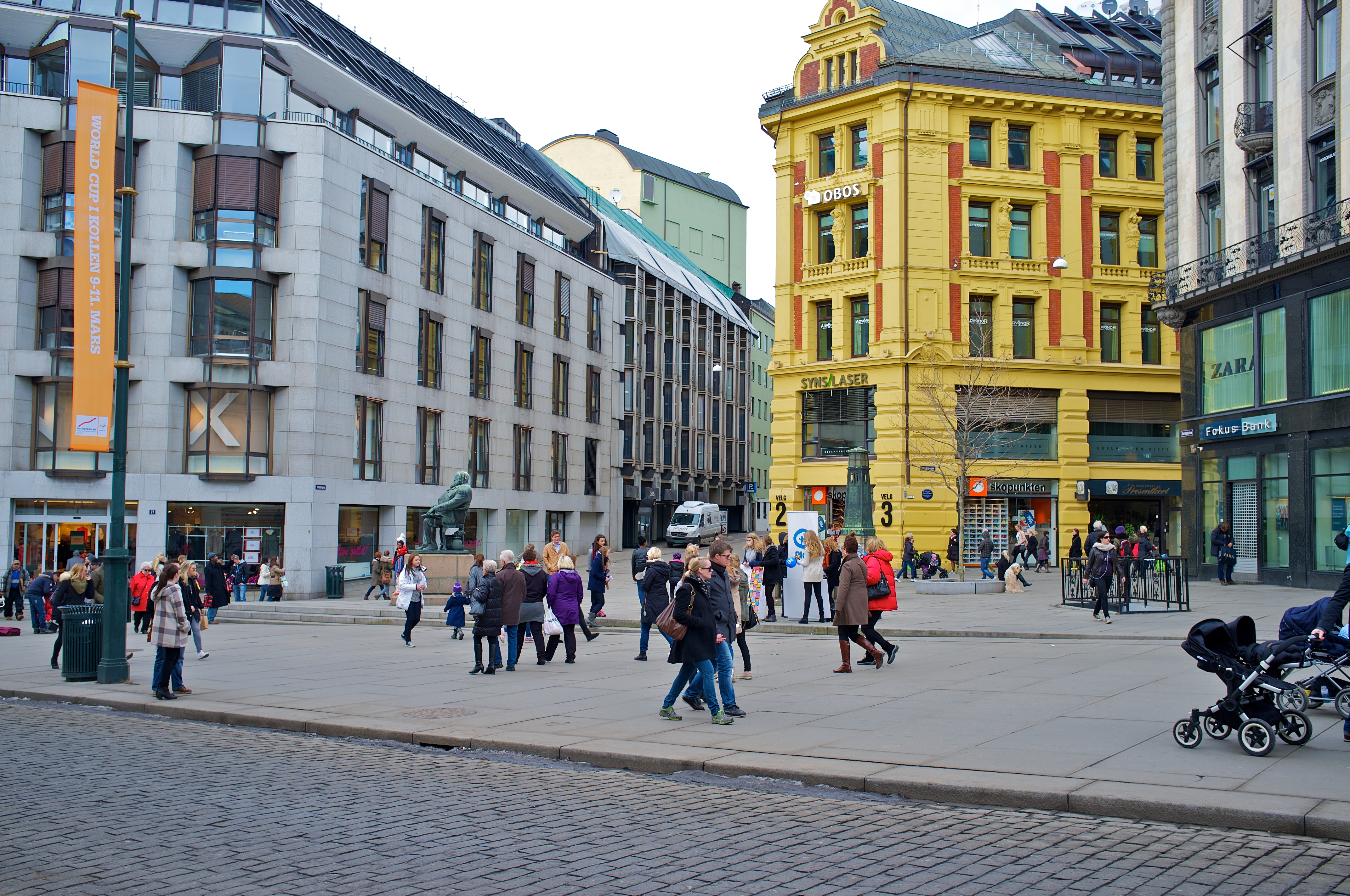 Stortings plass (Dasslokket) i Oslo.